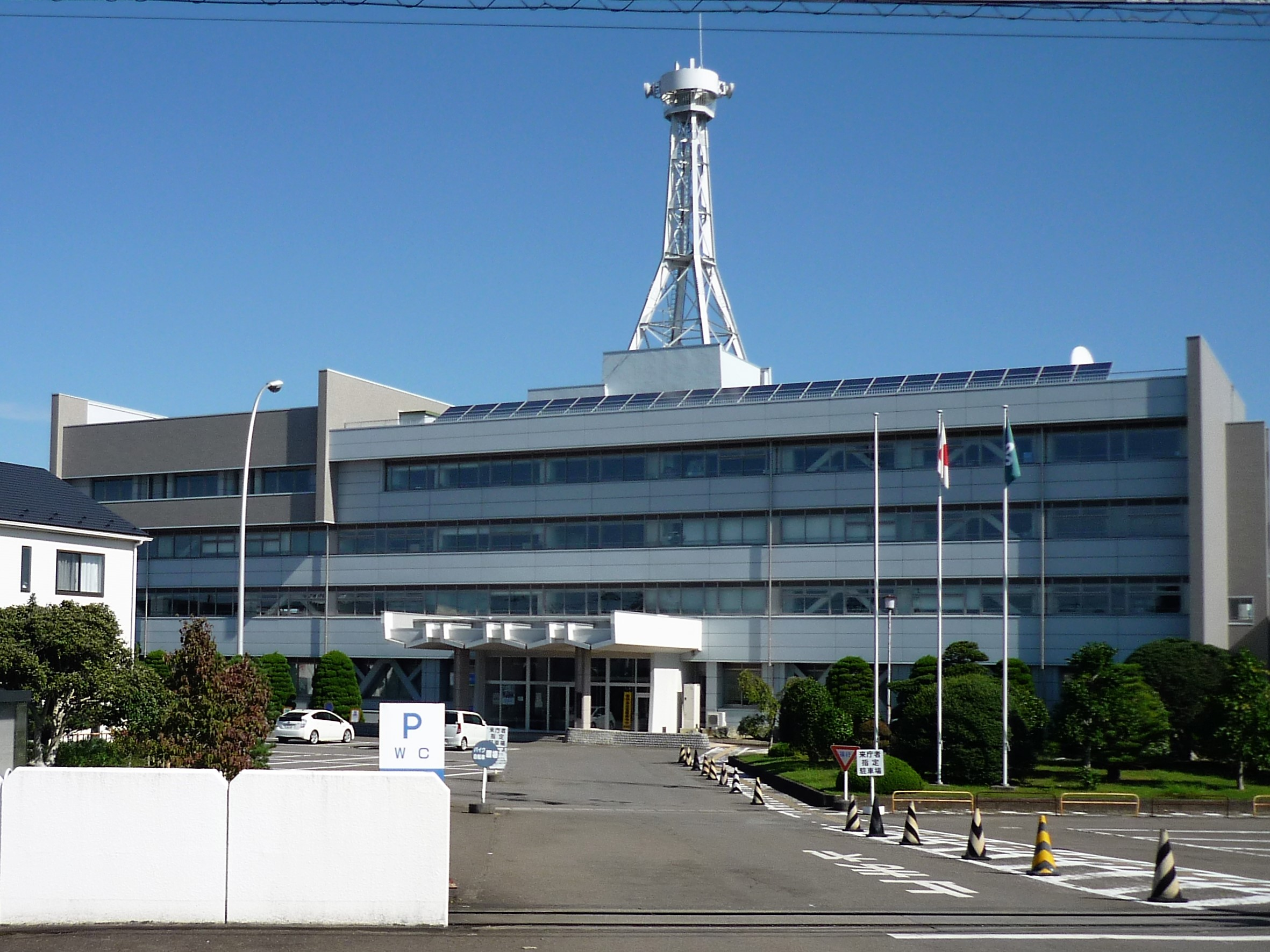 宮城県大河原合同庁舎 Panasonic Lumix DMC-FS3